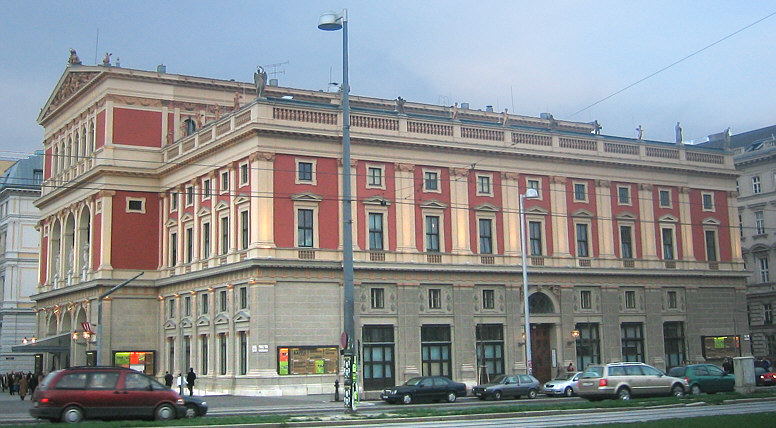 Wien, Austria: Musikverein (concert hall)